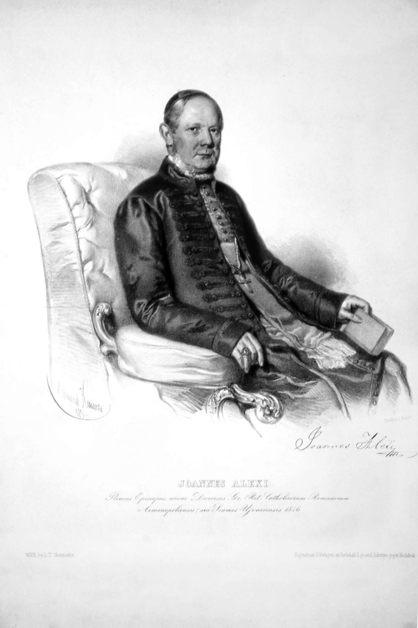 Johannes (Joan) Alexi (1800-1863), 1. Bischof von Gherla Lithographie von Eduard Kaiser, 1856